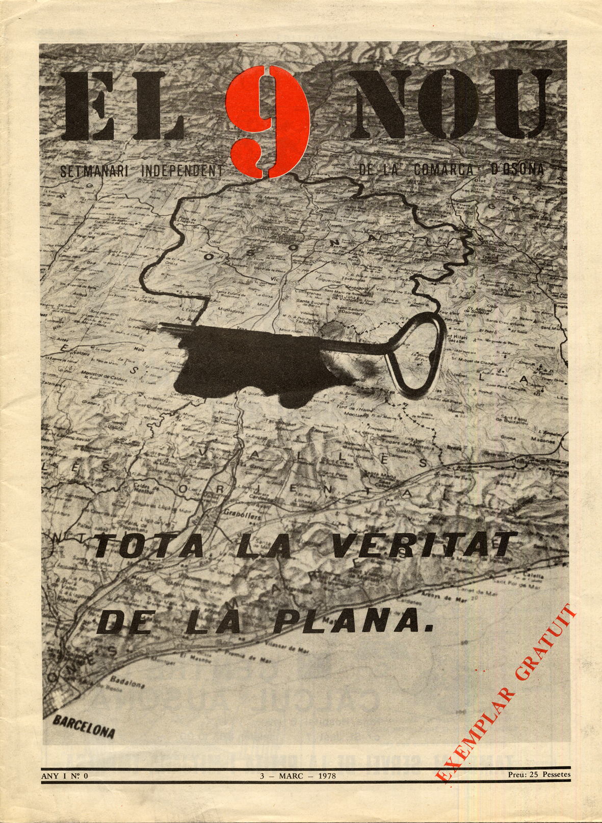 Primera pàgina del primer número del periòdic El 9 Nou, aparegut a la comarca d'Osona el 3 de març de 1978